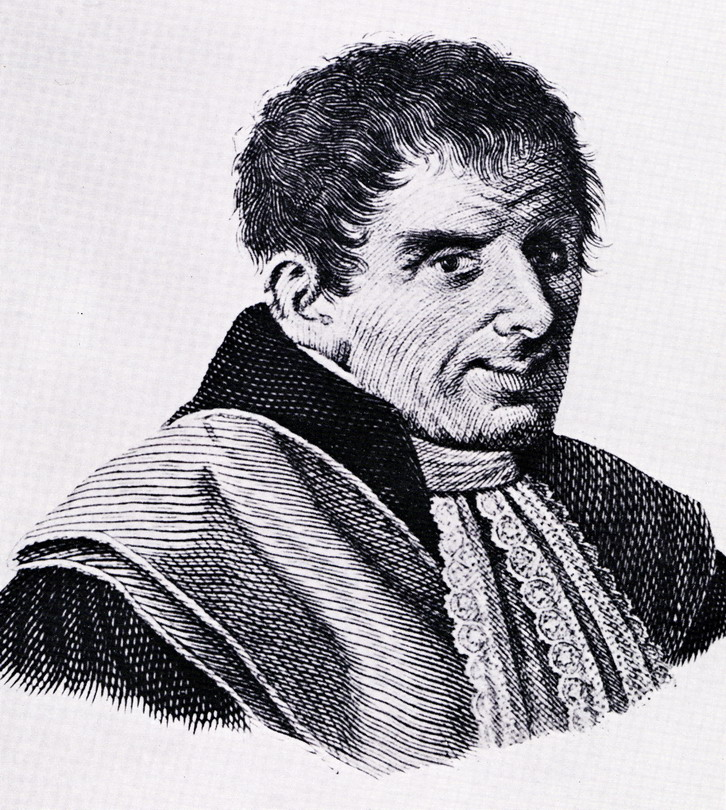 Ritratto di Luigi Valeriani (1758-1828)